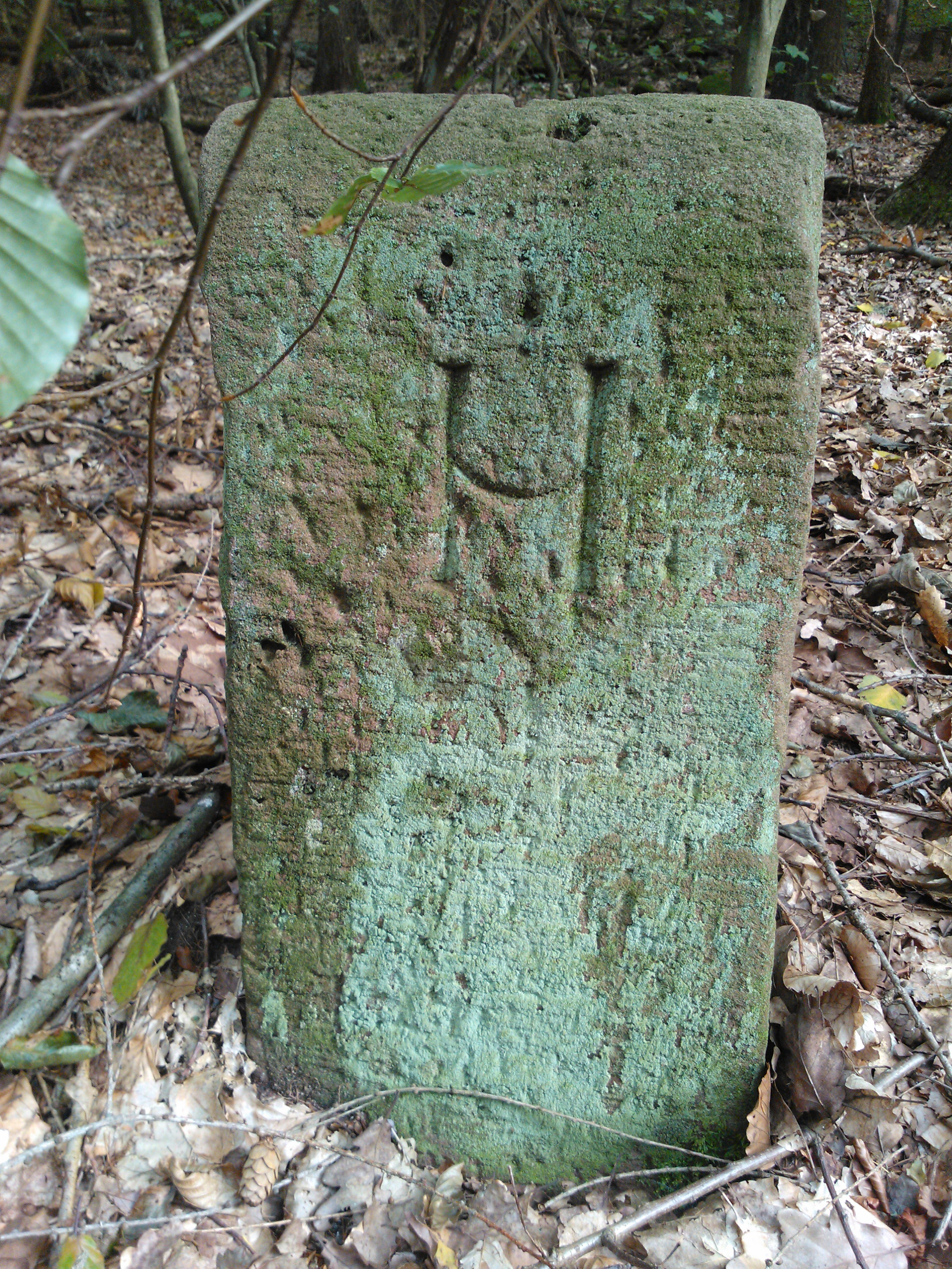 Ein Gemarkunsgstein am westlichen Rand des Jagschlosses mit einem "H" für den Ort Hetzbach